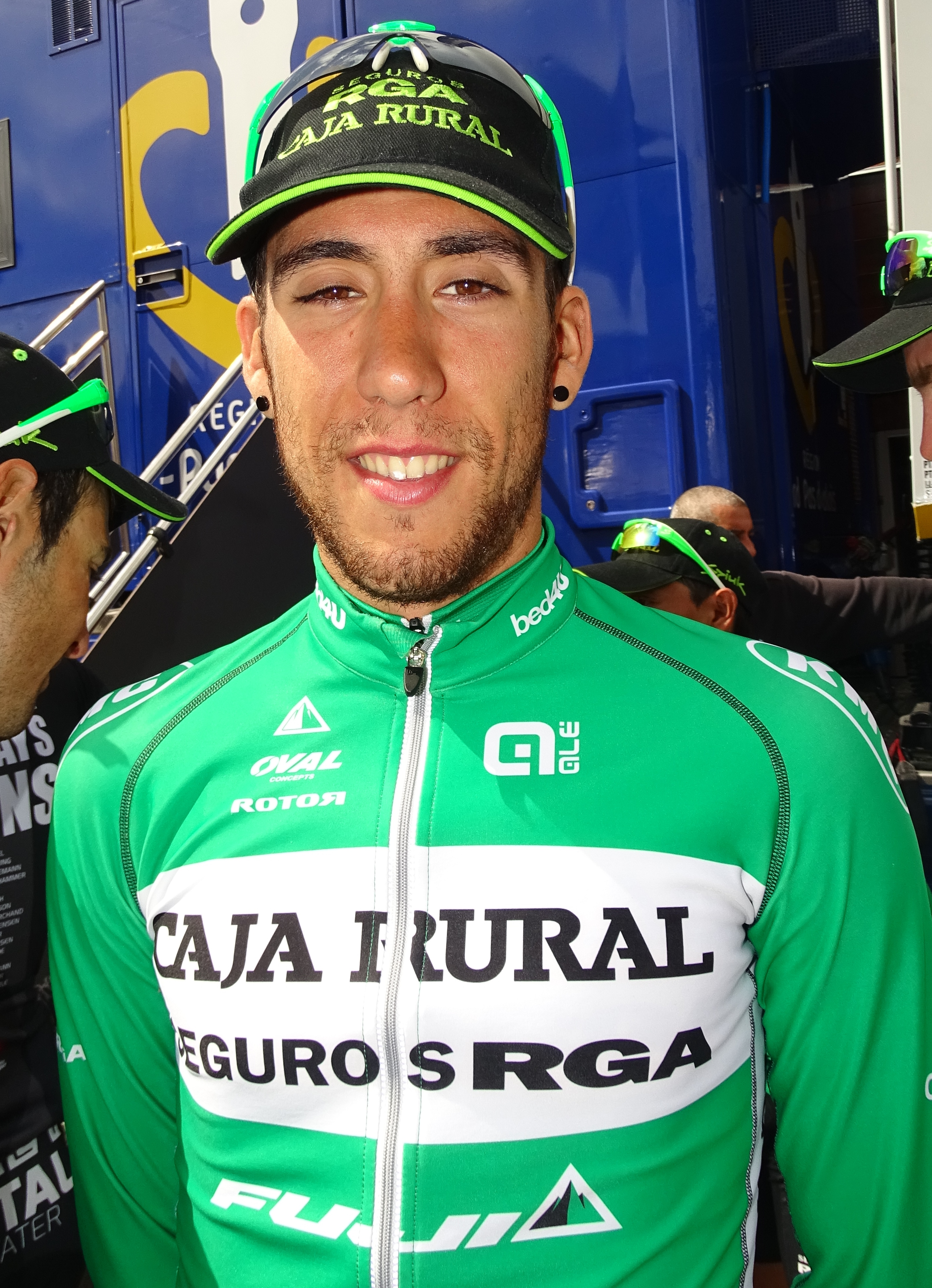 Reportage réalisé le dimanche 10 mai 2015 à l'occasion du départ de la quatrième étape des Quatre jours de Dunkerque 2015 à Cappelle-la-Grande, Nord, Nord-Pas-de-Calais, France.